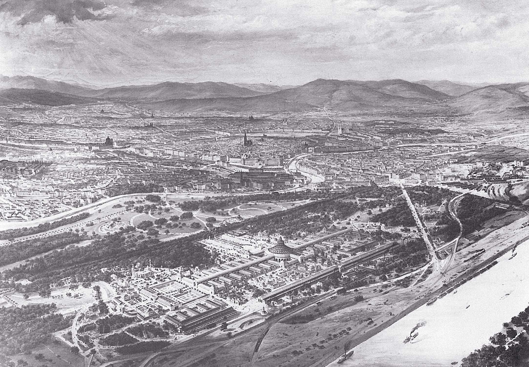 Luftaufnahme des Geländes der Weltausstellung in Wien 1873 in der Bildmitte unten deutlich die Rotunde, davon nach links gehend die Kaiserallee, welche sich mit der (von links unten nach rechts oben verlaufenden) Prater Hauptallee kreuzt. Rechts unten die Donau mit der -- von der Donau zum Praterstern verlaufenden -- Ausstellungsstraße. Von allen Gebäuden der Weltausstellung sind heute nur noch zwei erhalten.